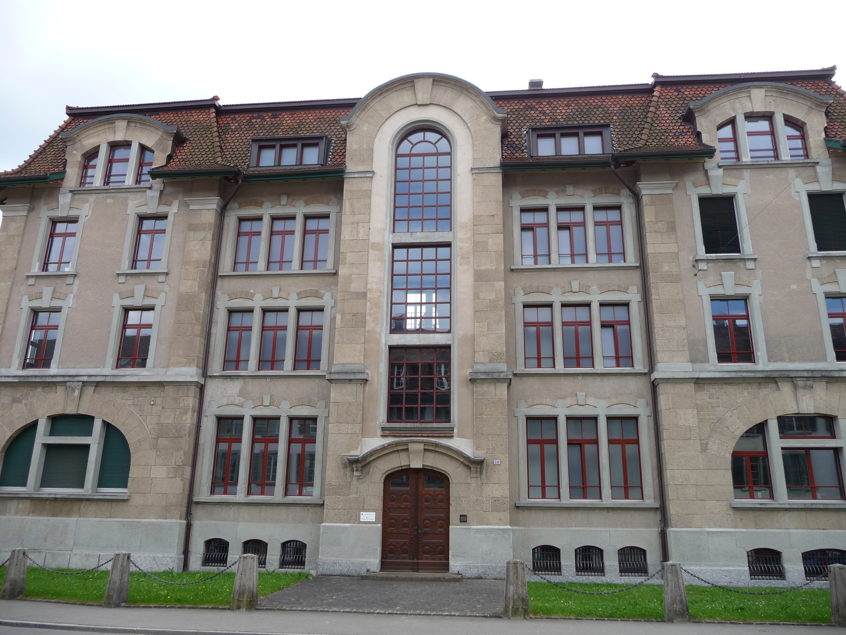 Trompeterhaus in Aarau